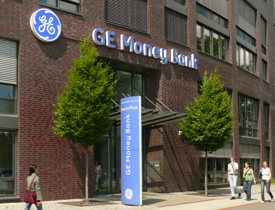 Einrichtung Headoffice der GE Money Bank in Hannover